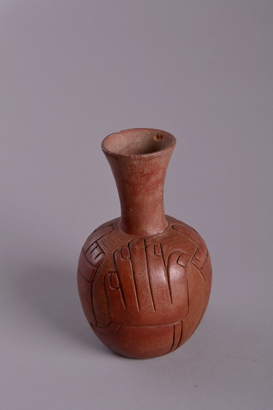 Bottiglia con camera globulare, base piana circolare, superiormente un versatoio svasato. Cottura ossidante. Impasto medio-fine di colore ocra chiaro con ingobbio fine di colore rosso. La camera è stata eseguita a colombino, il versatoio è stato assemblato successivamente. Levigatura accurata. La camera della bottiglia è decorata, per incisione, con due disegni dai tratti sechinoidi - chavinoidi, rappresentanti una mano e altri motivi geometrici. L'iconografia ricorda le "parti di corpo" ritratte nelle steli del centro cerimoniale di Sechin.